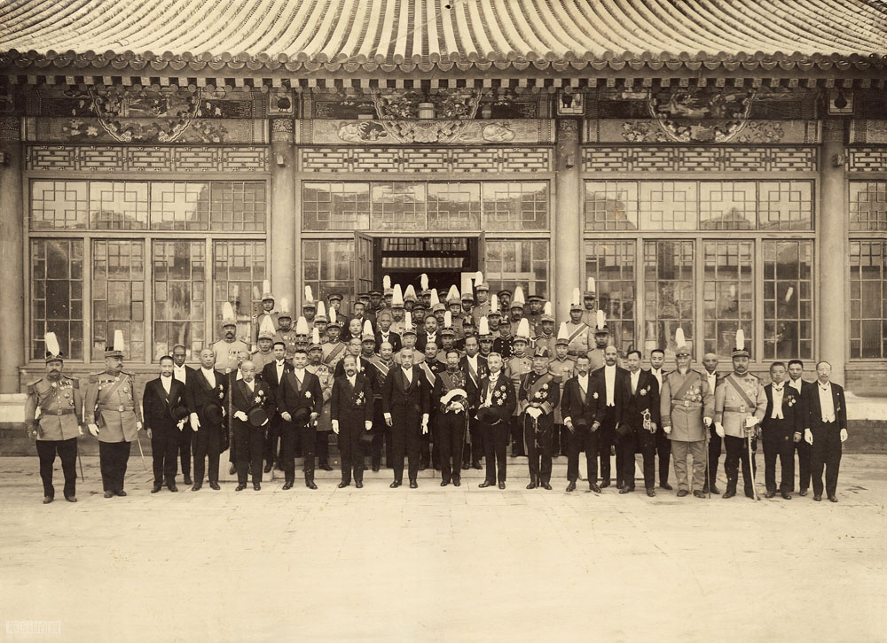 这张照片是在徐世昌完成就任总统仪式后与众官员的合影。前排左八（中握手套者）为徐世昌，前排左六为朱深，左七为国务总理钱能训，左九为外交总长陆征祥，左十为曹汝霖，左十一为海军总长刘冠雄，左十二为傅增湘。 徐世昌被选为总统后，便郑重地问礼于内务总长钱能训，以行交接大礼。中华民国史上第一次总统交接仪式于1918年10月10日上午举行，徐世昌乘汽车进公府（中南海），礼官导徐至怀仁堂礼台。9点正，临时大总统冯国璋由居仁堂到怀仁堂，与徐同向国旗行三鞠躬礼，礼毕，冯东向致颂词，徐西向致答词，词毕互相一鞠躬，礼官送冯回居仁堂，冯即迁出公府。10时整，徐在居仁堂南向，向议长及议员宣读誓词，词毕转北向，与议长议员同向国旗三鞠躬，礼毕议长议员转东向，阁员及文武百官西向，徐立于礼台宣读就职宣言。读毕，各行三鞠躬礼庆贺，完成了仪式。